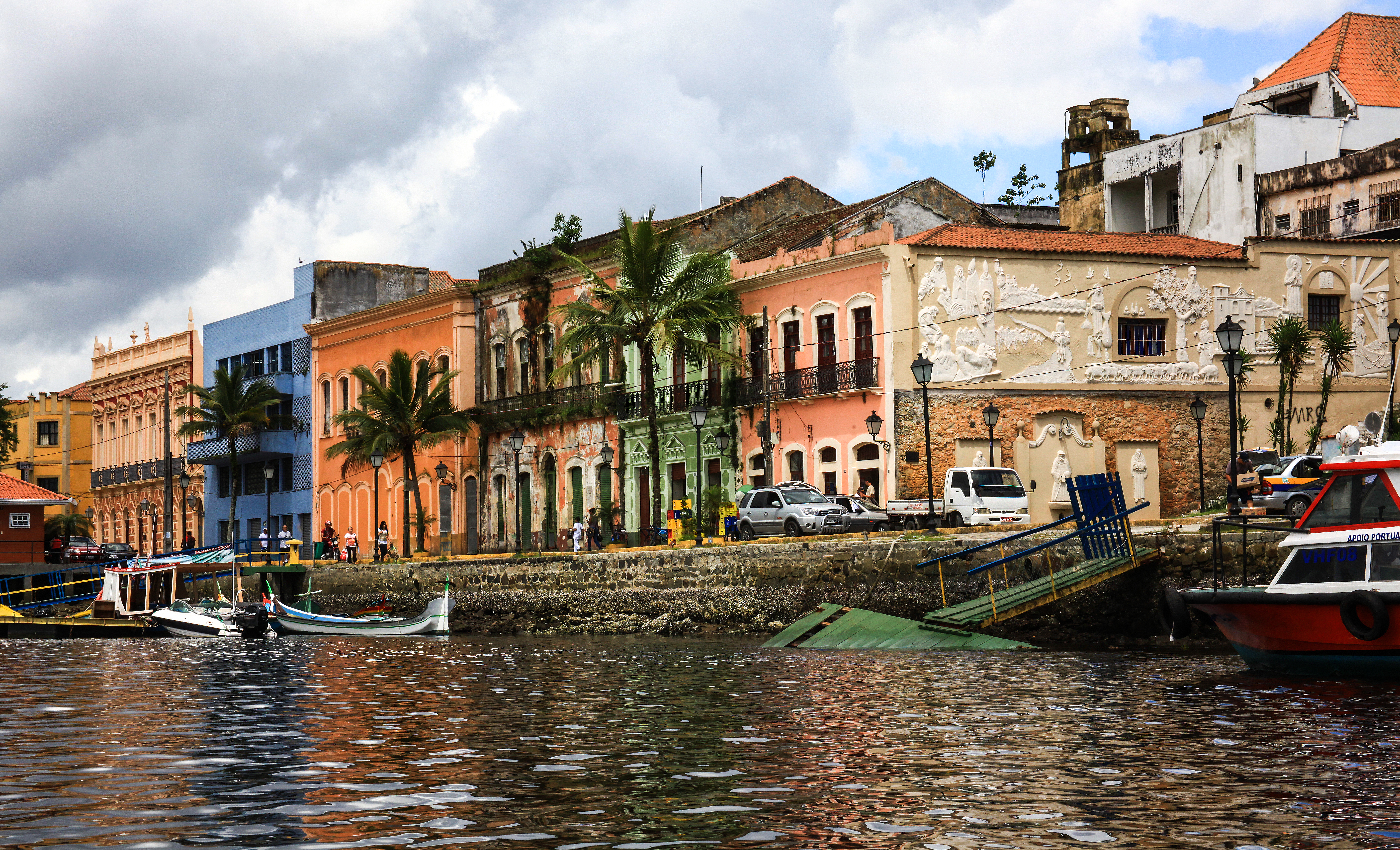 Conjunto Arquitetônico e Urbanístico da Cidade de Paranaguá